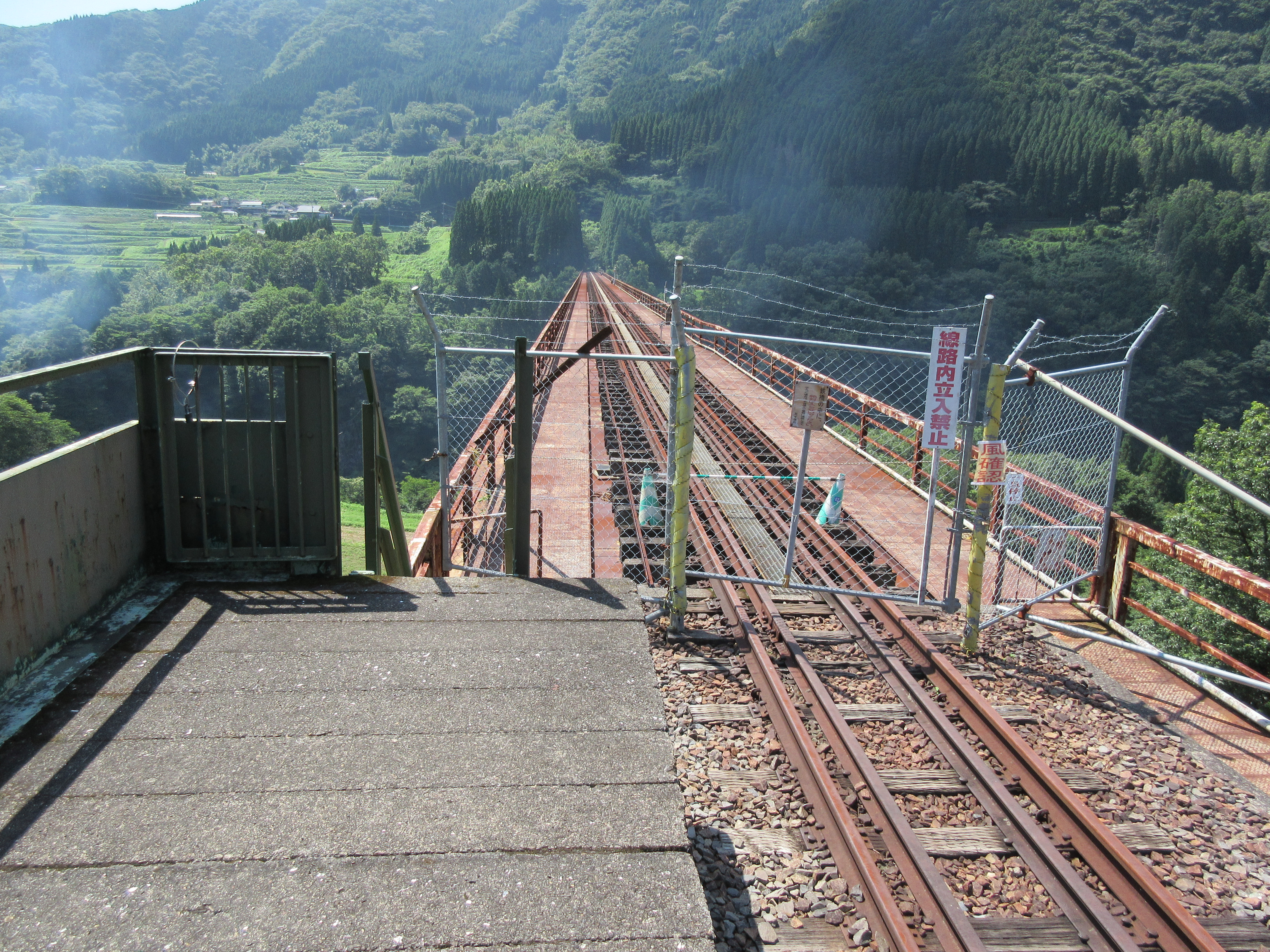 熊本地震によって閉鎖された高千穂橋梁。2016年7月23日からまた通行可能になった。